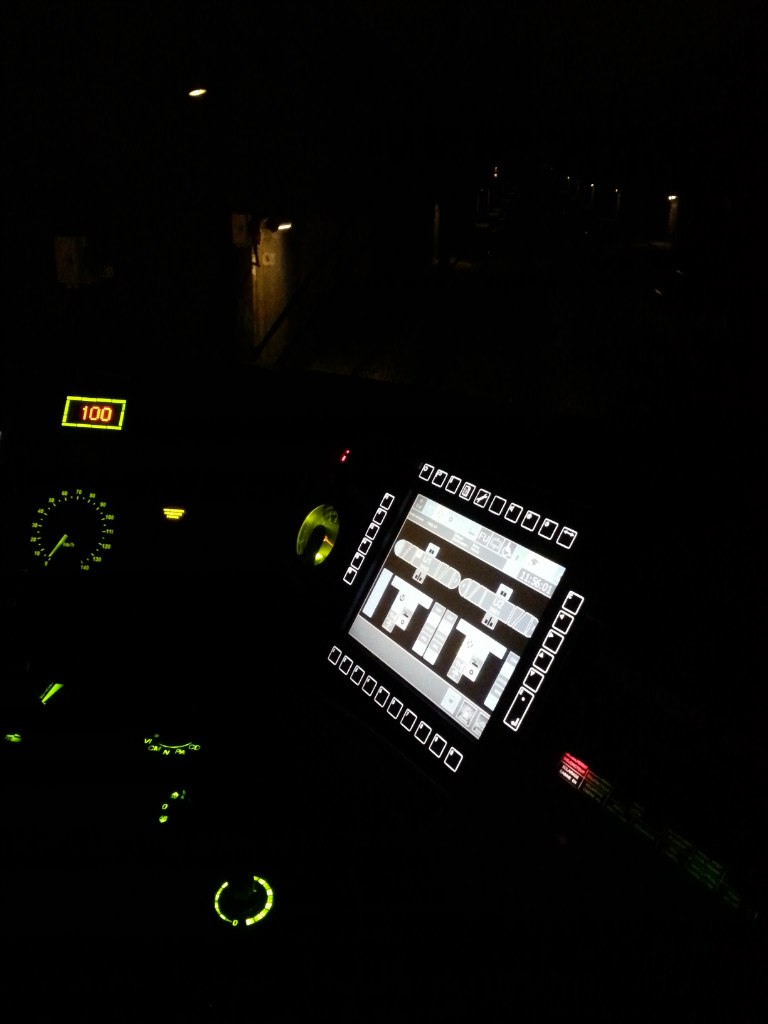 Tableau de bord d'un MI 09 du RER A, avec le SACEM en fonctionnement.